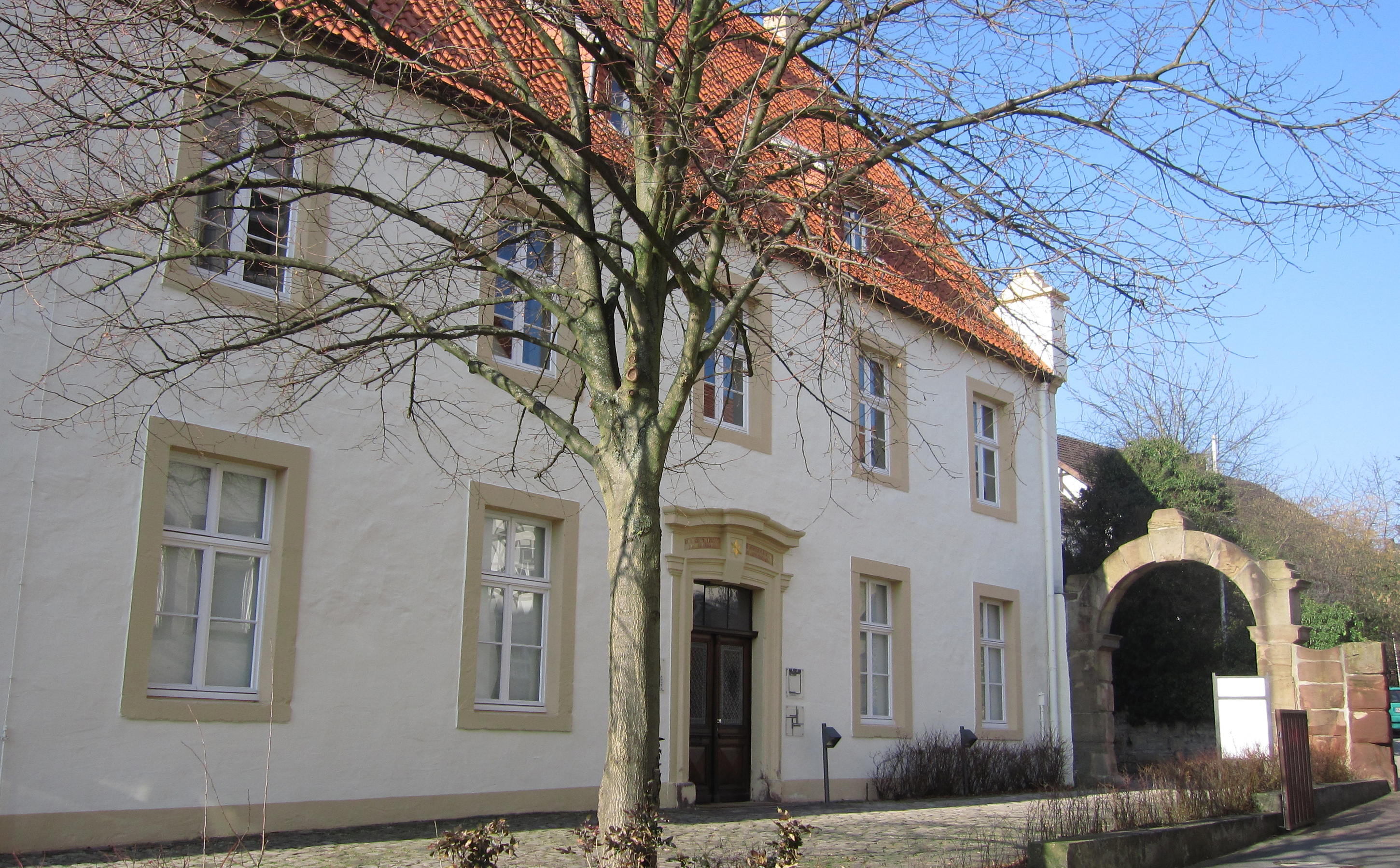 Das Museum im Stern in Warburg.